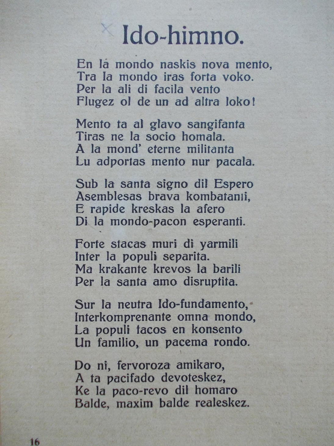 Ido: Versiono en Ido da Heinrich Peus di La Espero da L. L. Zamenhof